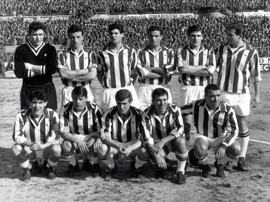 Una formazione della Juventus nella stagione 1962-63.